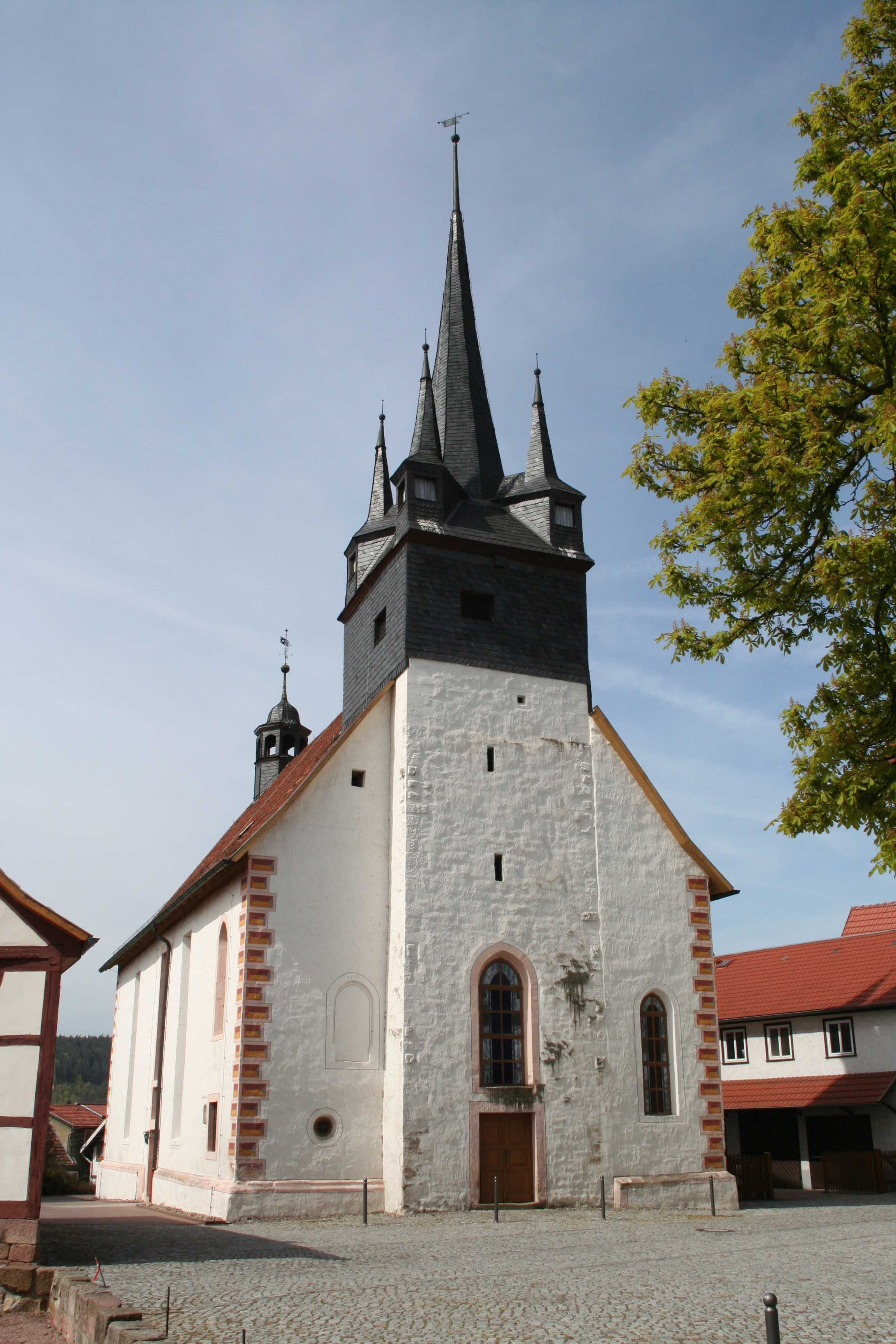 evangelische Kirche in Schwallungen, Landkreis Schmalkalden-Meiningen